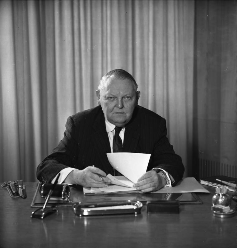 Minister Erhard - Portrait